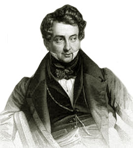 Mikhail Vielgorsky (1788-1856)